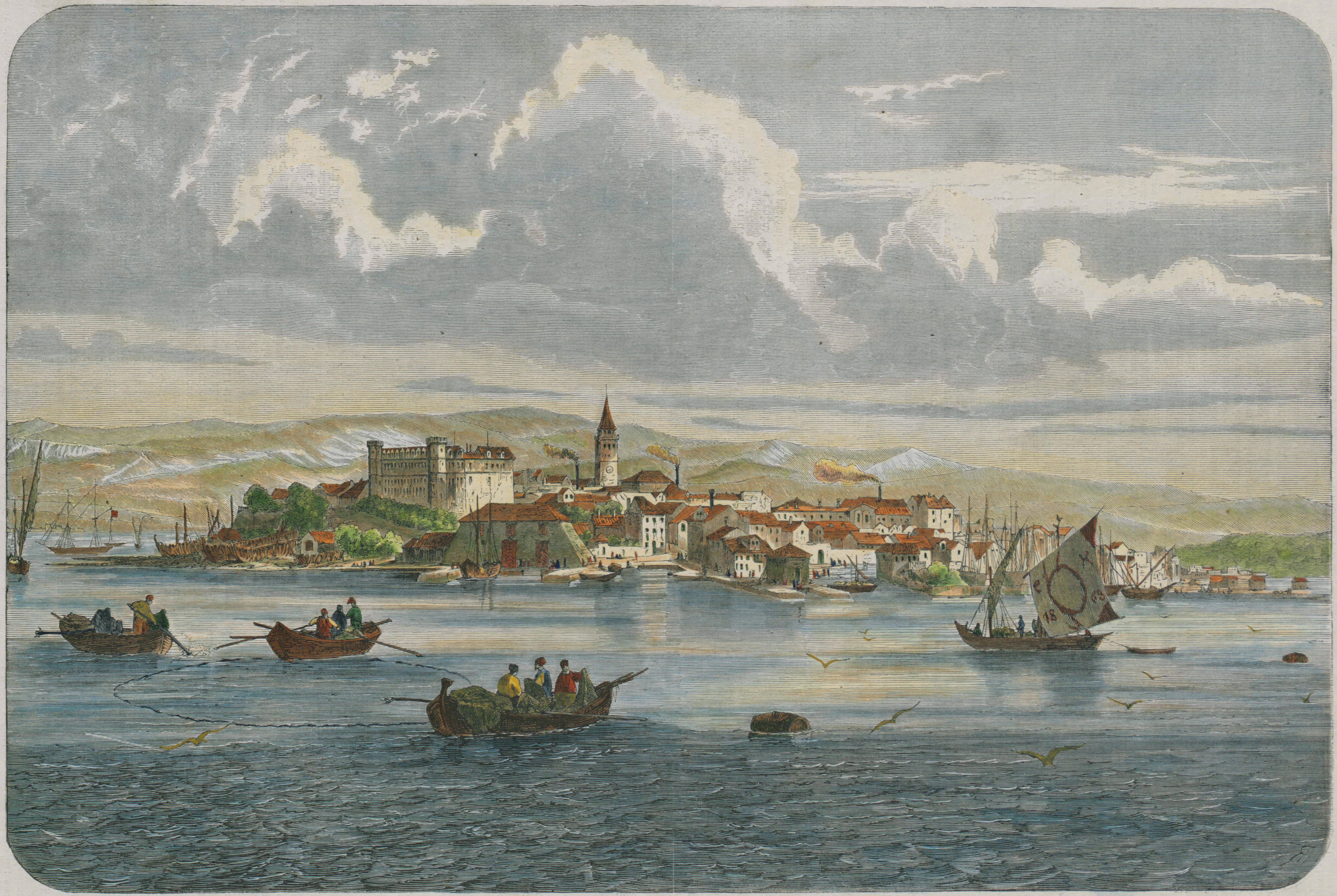 Veduta Kopra